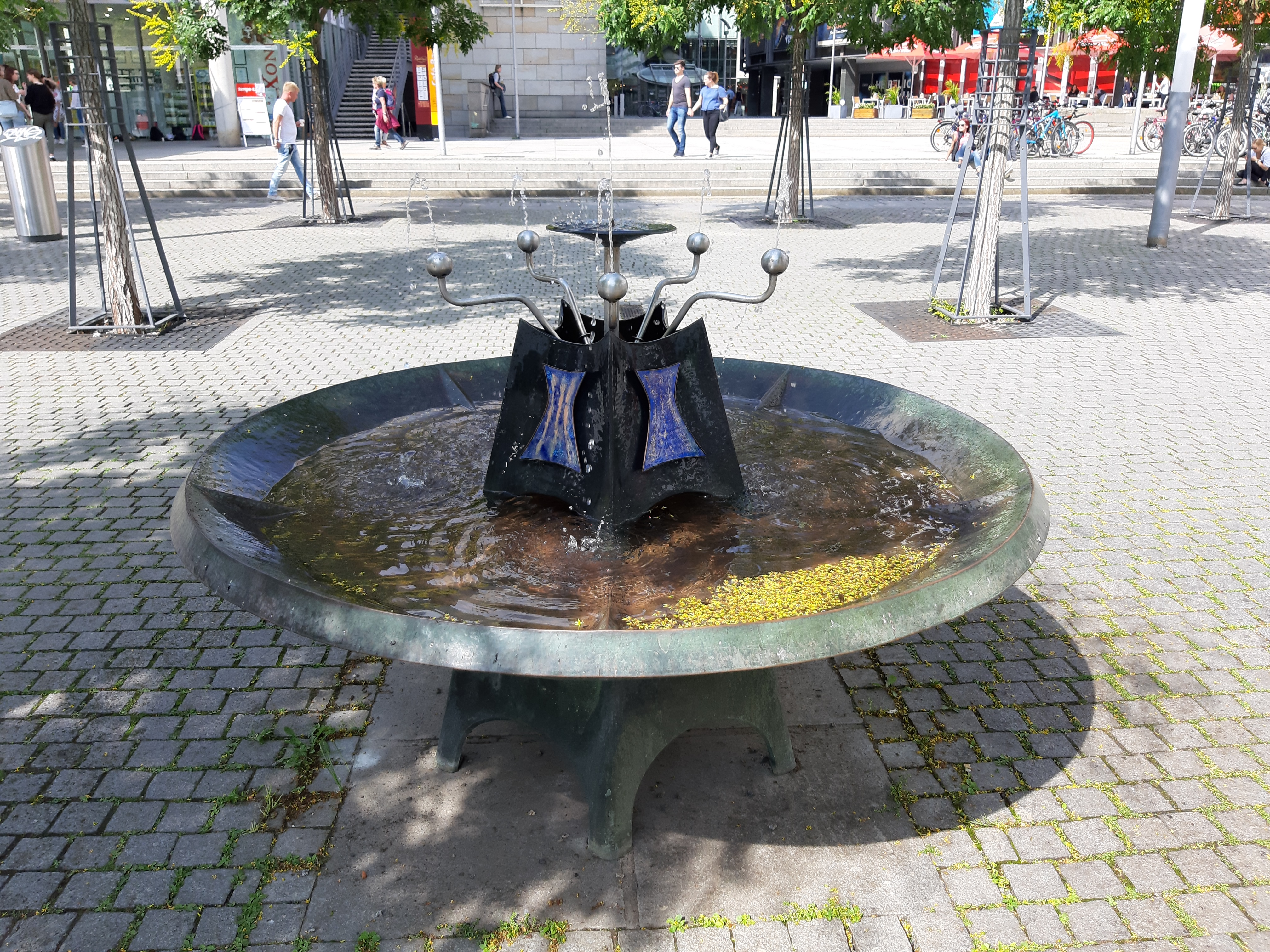 Trinkbrunnen (1969) von Vinzenz Wanitschke (* 1932) auf der Prager Straße in Dresden